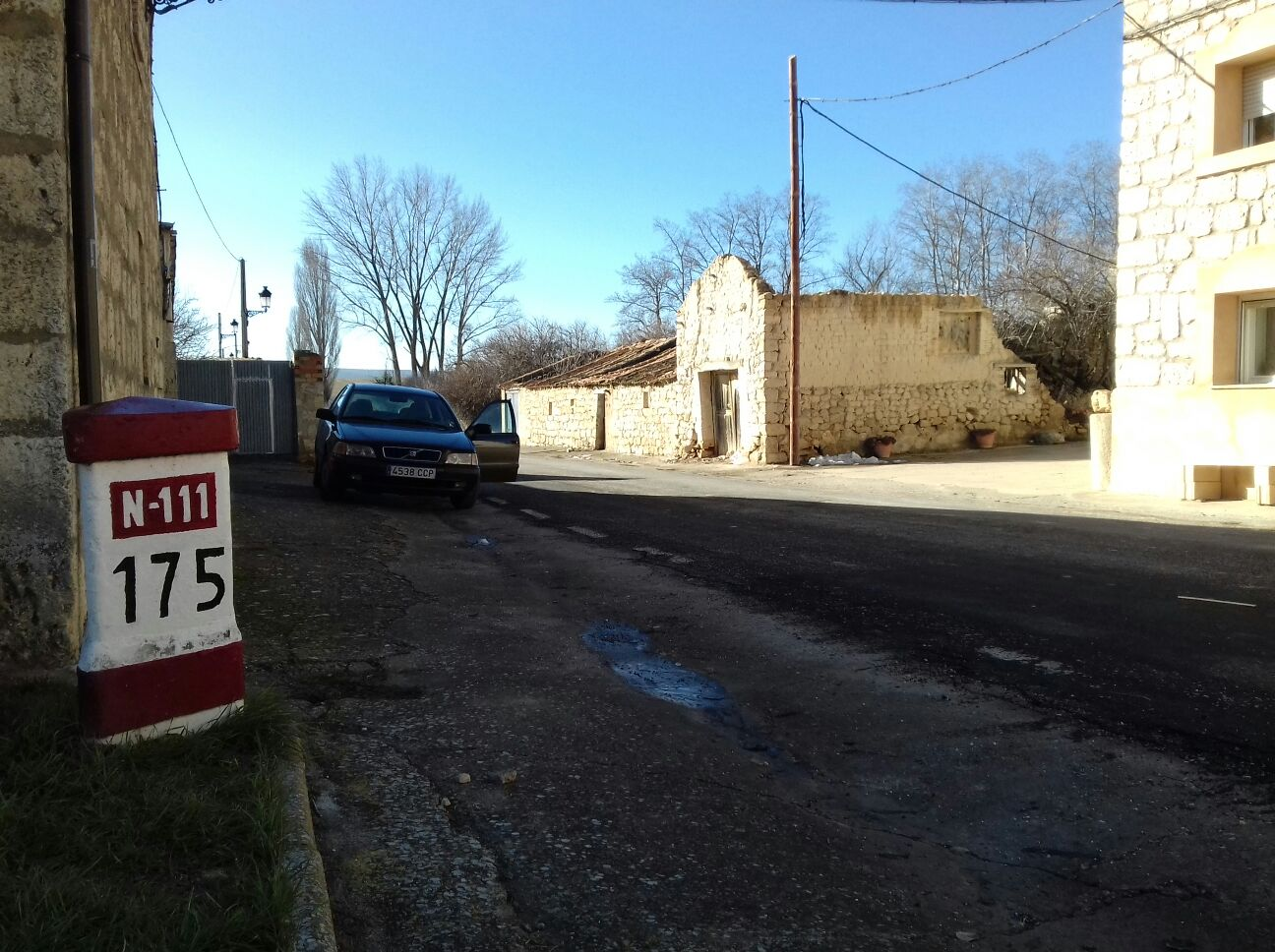 fito quilométrico n° 175 da N-111 en Adradas